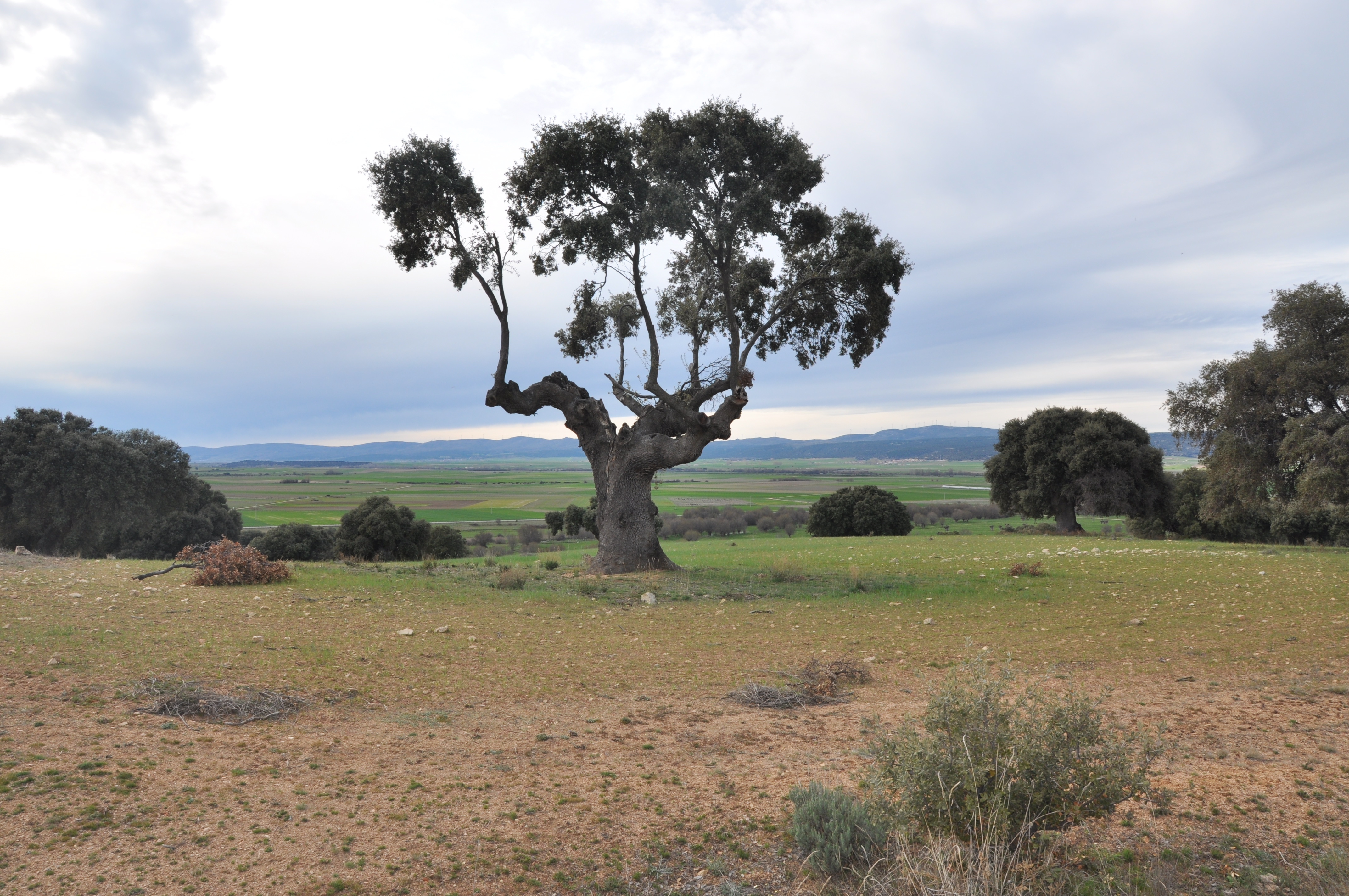 Encina